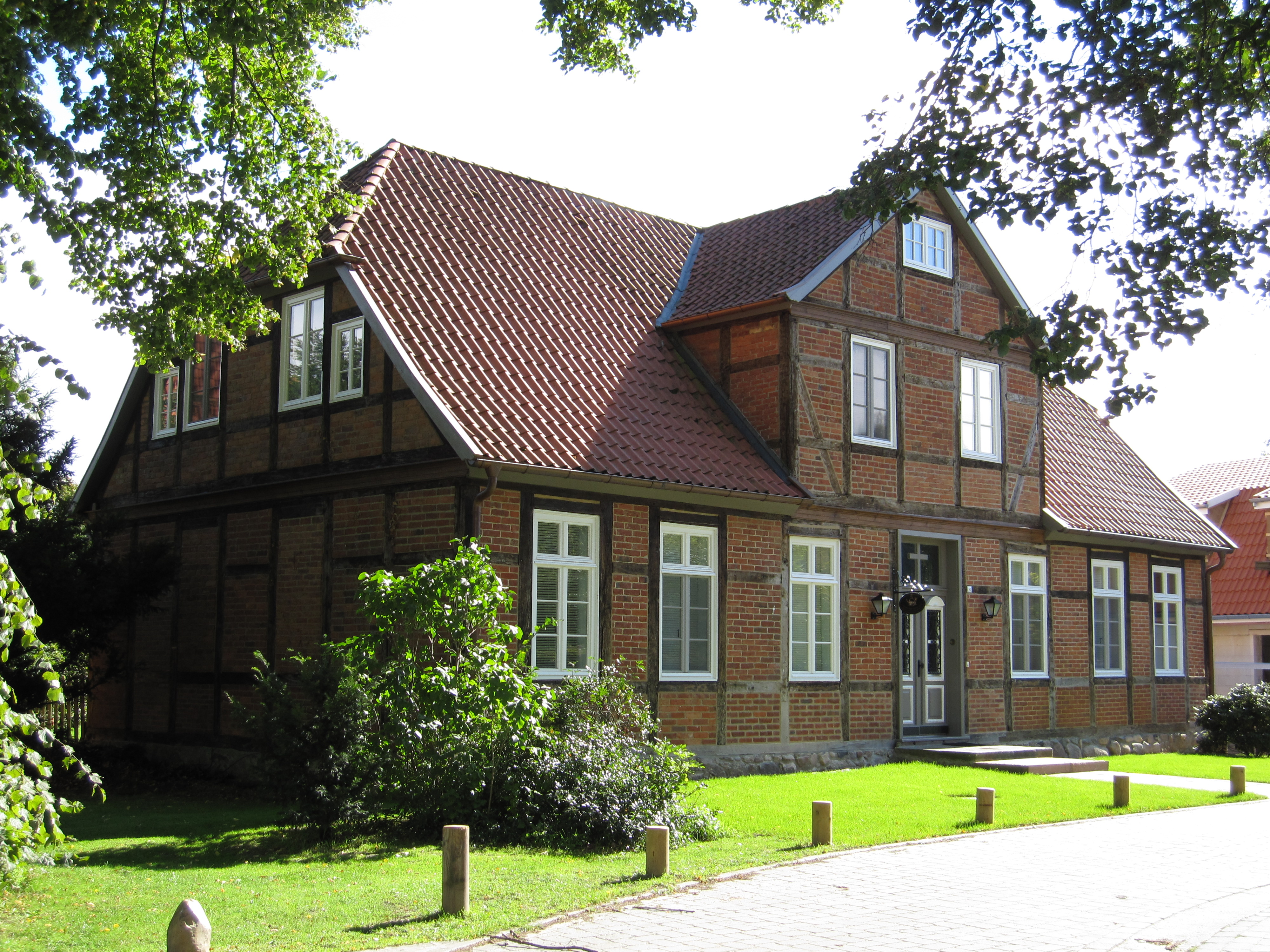 Altes Gebäude hinter der Peter und Paul Kirche in Lüdersburg. Es ist das Pfarrhaus